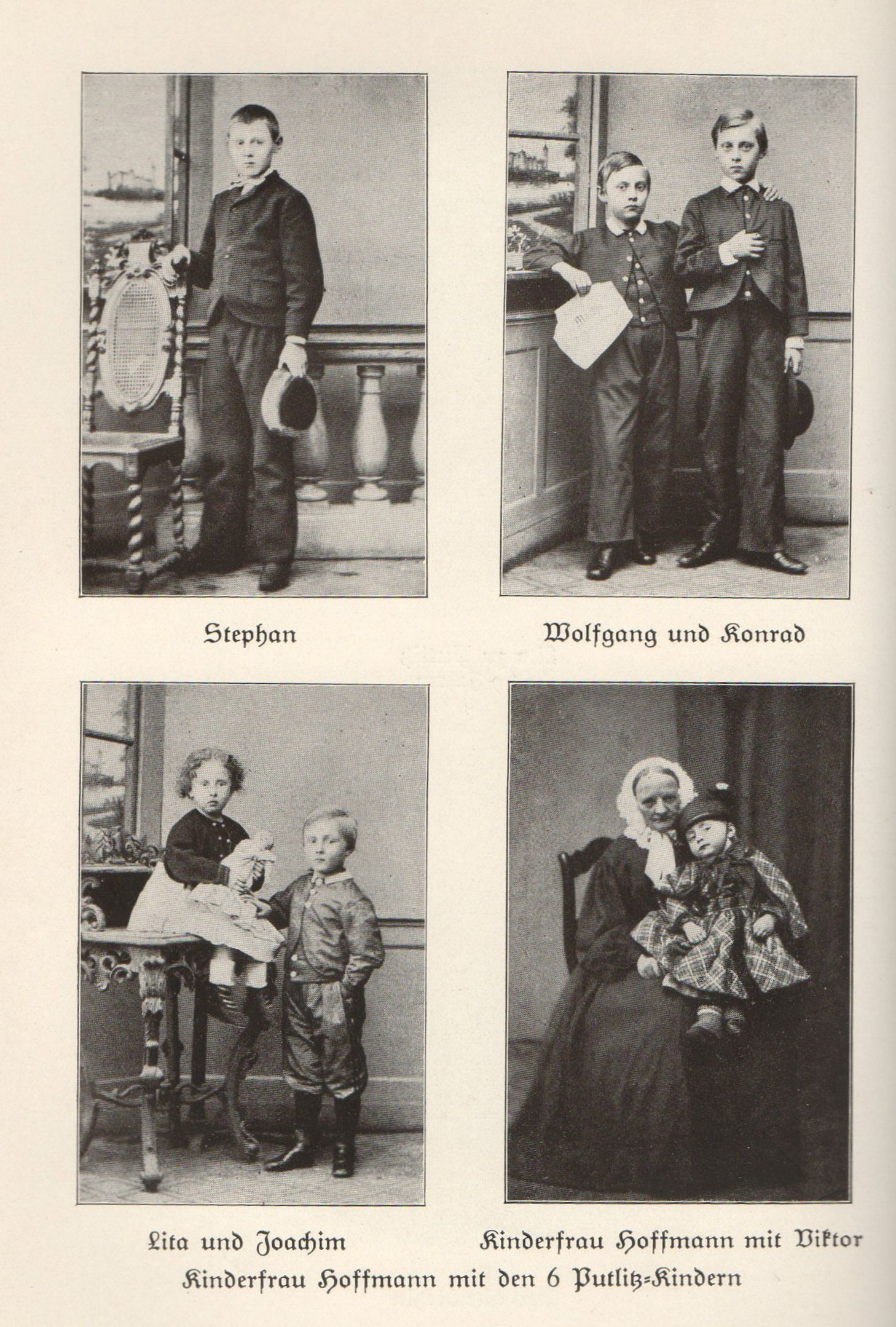 die Kinder von Gustav Gans zu Putlitz und ihre Kinderfrau Hoffmann